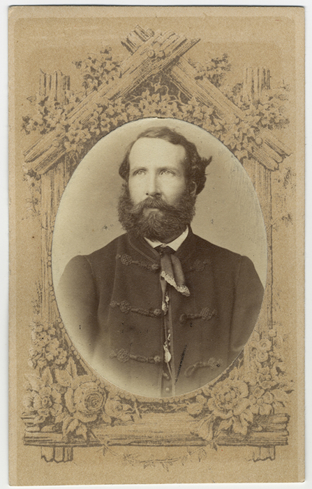 Rosti Pál (1830–1874) földrajztudós, néprajztudós, fotográfus, az MTA levelező tagja portréja. Schrecker Ignác fényképfelvétele (1865)